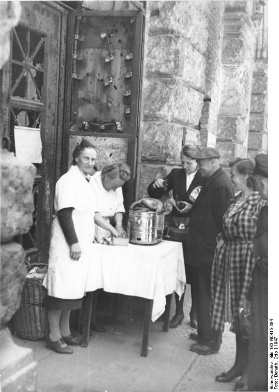 ADN-ZB/Donath Berlin 1947 Heiße Bockwurst am Stand Mauer- Ecke Leipziger Straße